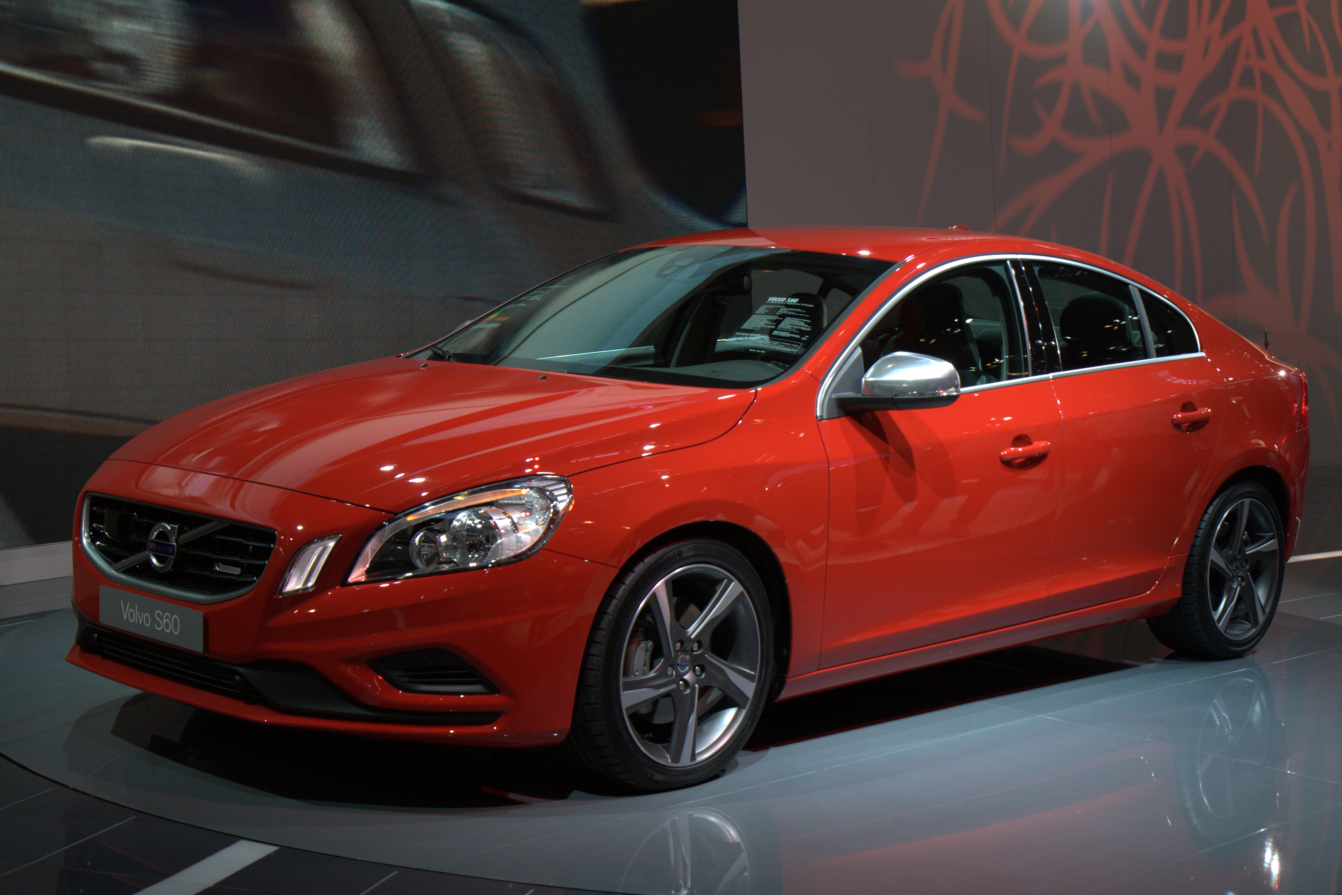 Une Volvo S60 au mondial de l'automobile de Paris en 2010.